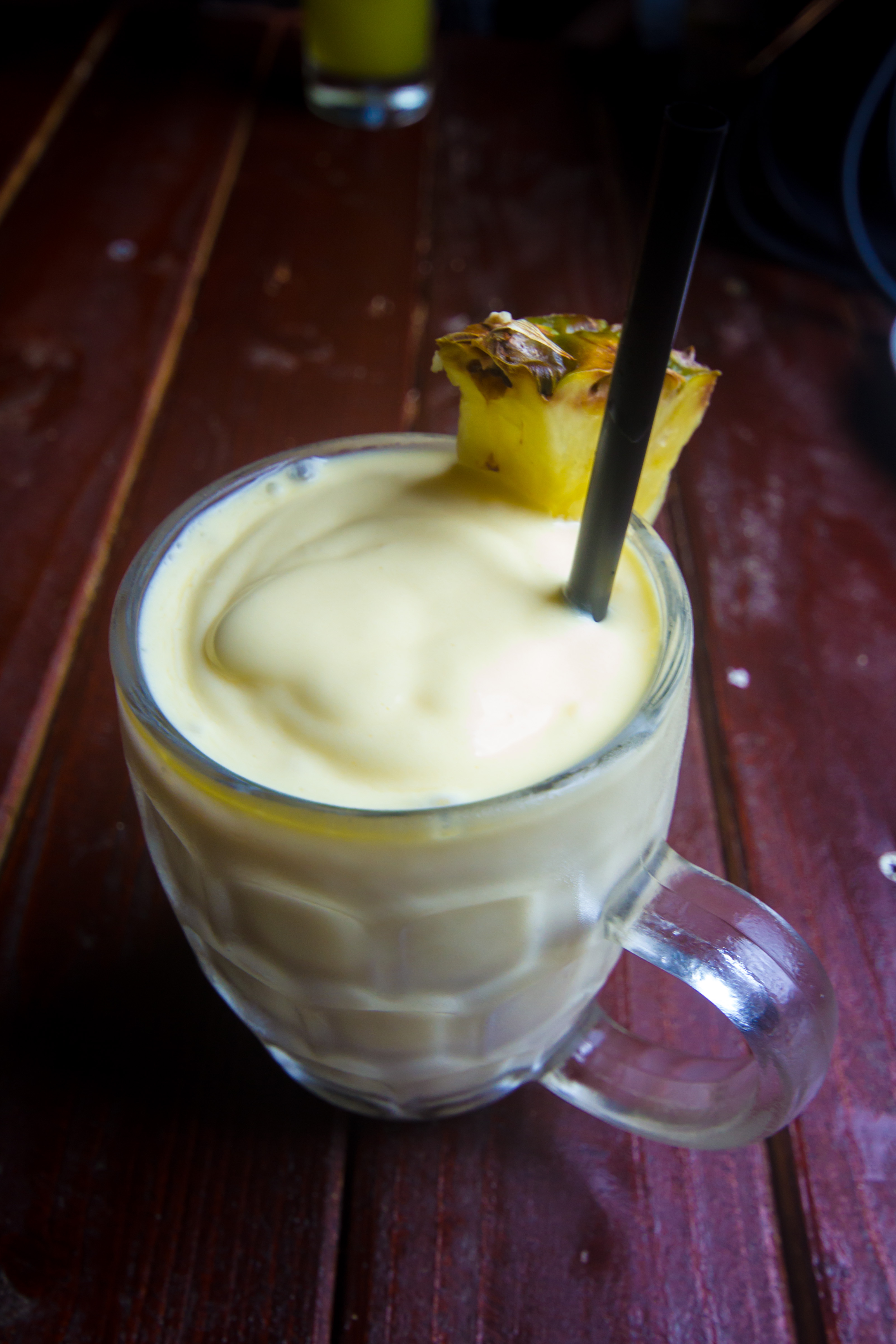 Niquita de ananás, bebida tradicional da Madeira